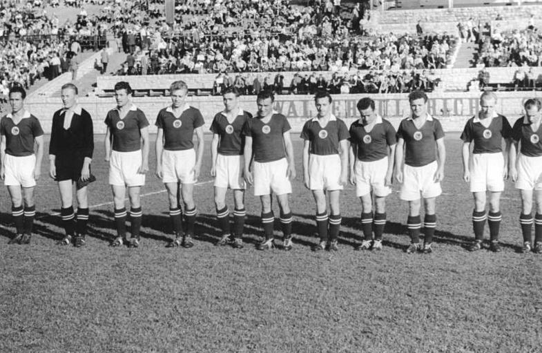 Zentralbild-Bey-Wen Bey-Qu 11.7.1956 Dynamo schlug Wismut 2:1. Im Berliner Walter-Ulbricht-Stadion standen sich in einem Fußball-Meisterschaftsspiel am Mittwoch, den 11. Juli 1956, die Mannschaften von Dynamo Berlin und Wismut Karl-Marx-Stadt gegenüber. Dynamo kam überraschend zu einem 2:1-Sieg. UBz. Die Mannschaft des SC Wismut Karl-Marx-Stadt. Wir erkennen von links nach rechts: Erhard Bauer, Kurt Steinbach, Willi Tröger, Bringfried Müller, Horst Freitag, Heinz Glaser, Siegfried Wolf, Günther Viertel, Konrad Wagner, Manfred Kaiser und Karl Wolf.